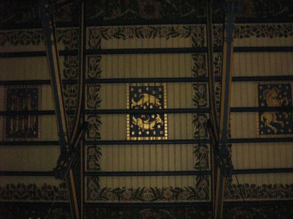 Sklepienie kościoła NNMP w Łęgu z znakami zodiaku